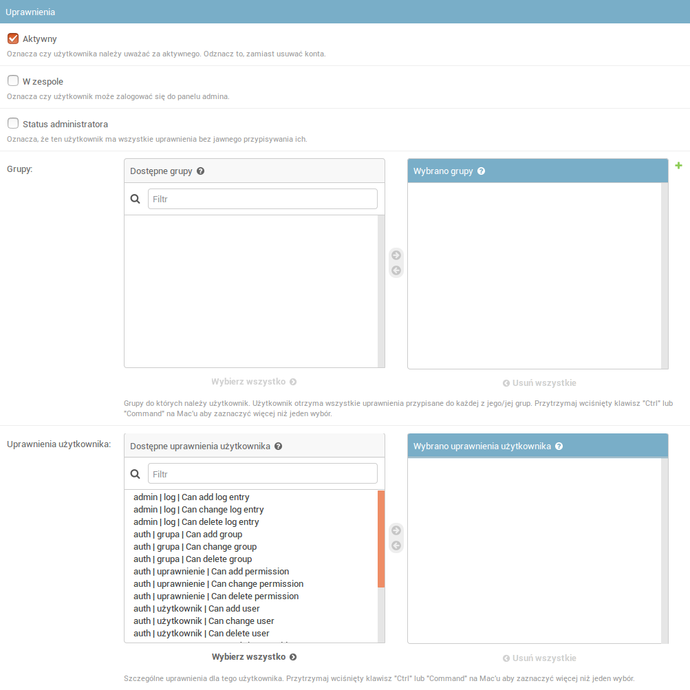 User Management in Django